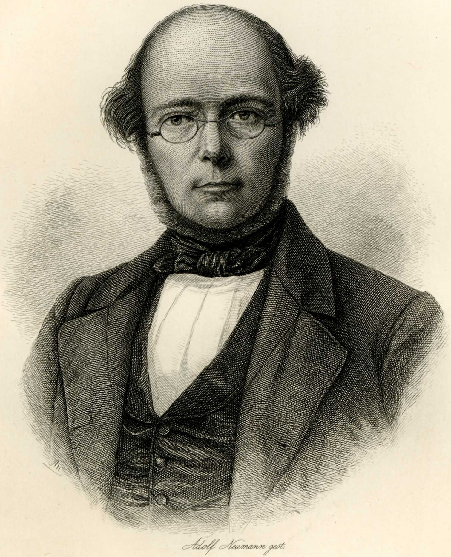 Theodor Bergk (1812–1881), deutscher klassischer Philologe. Stich von Adolf Neumann